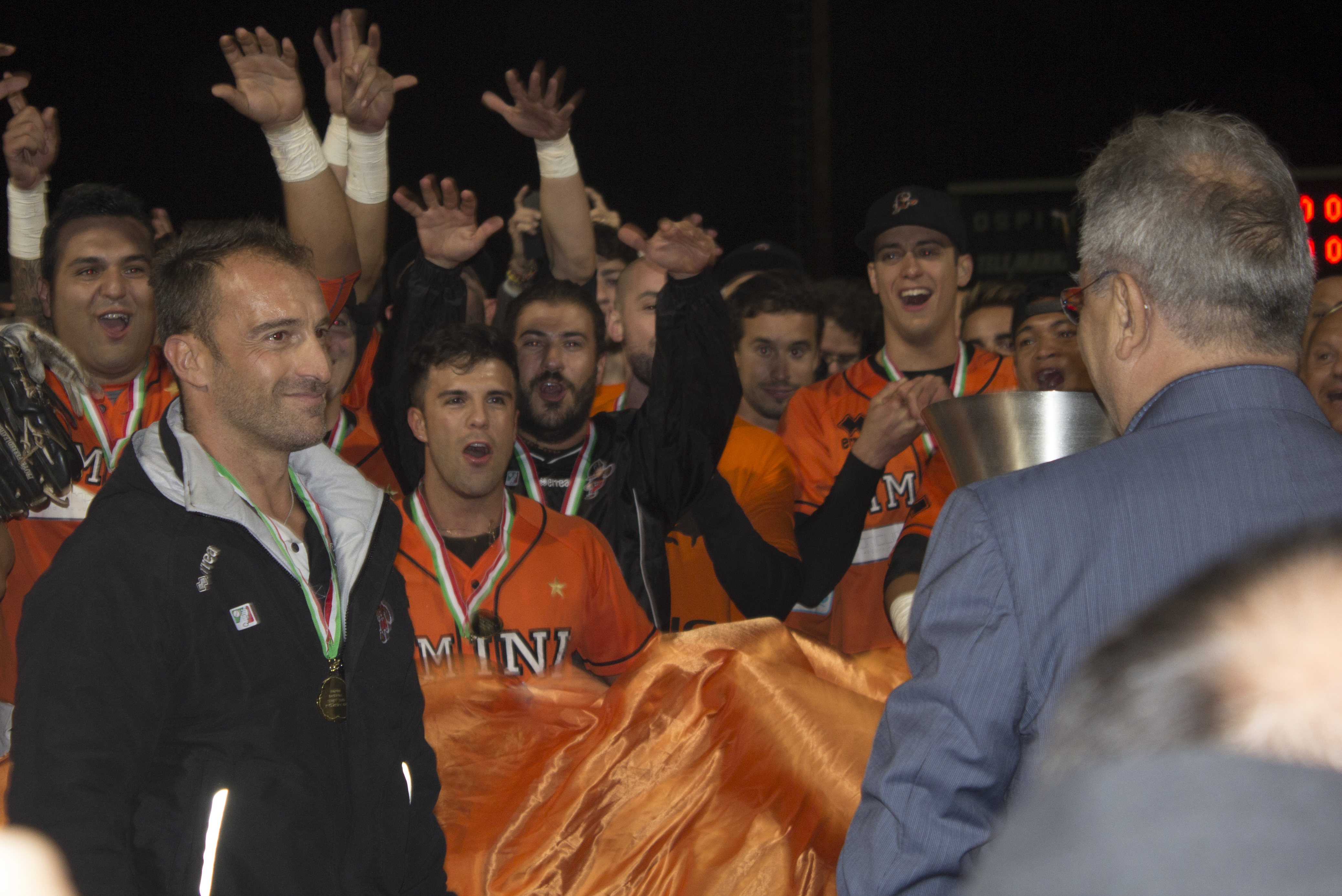 Filippo Crociati, ex capitano dei Pirati, si appresta a ricevere la coppa dello scudetto 2015 del Rimini Baseball dal presidente FIBS Riccardo Fraccari.